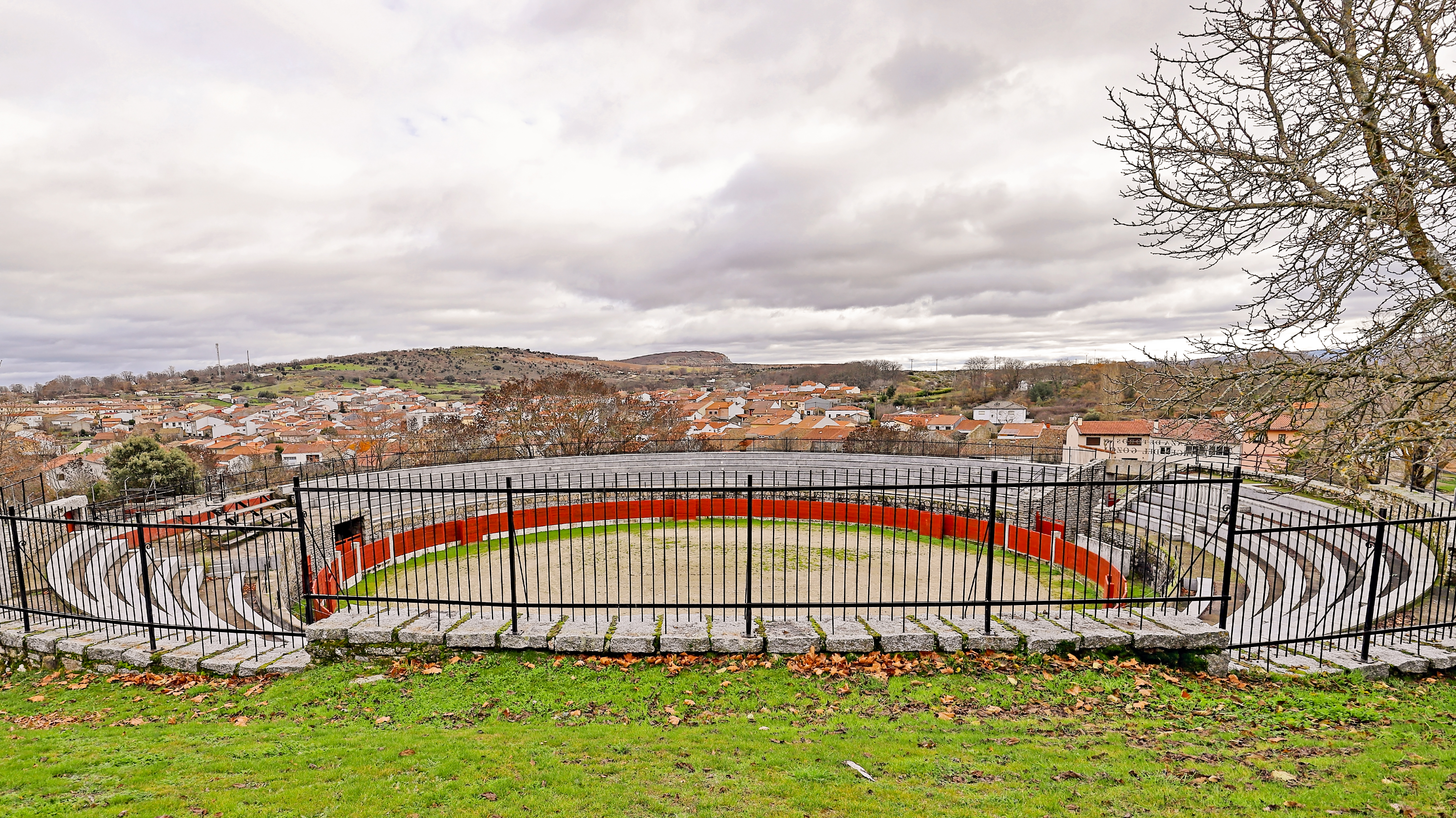 Los Santos es un municipio que pertenece a la comarca de Entresierras, provincia de Salamanca.